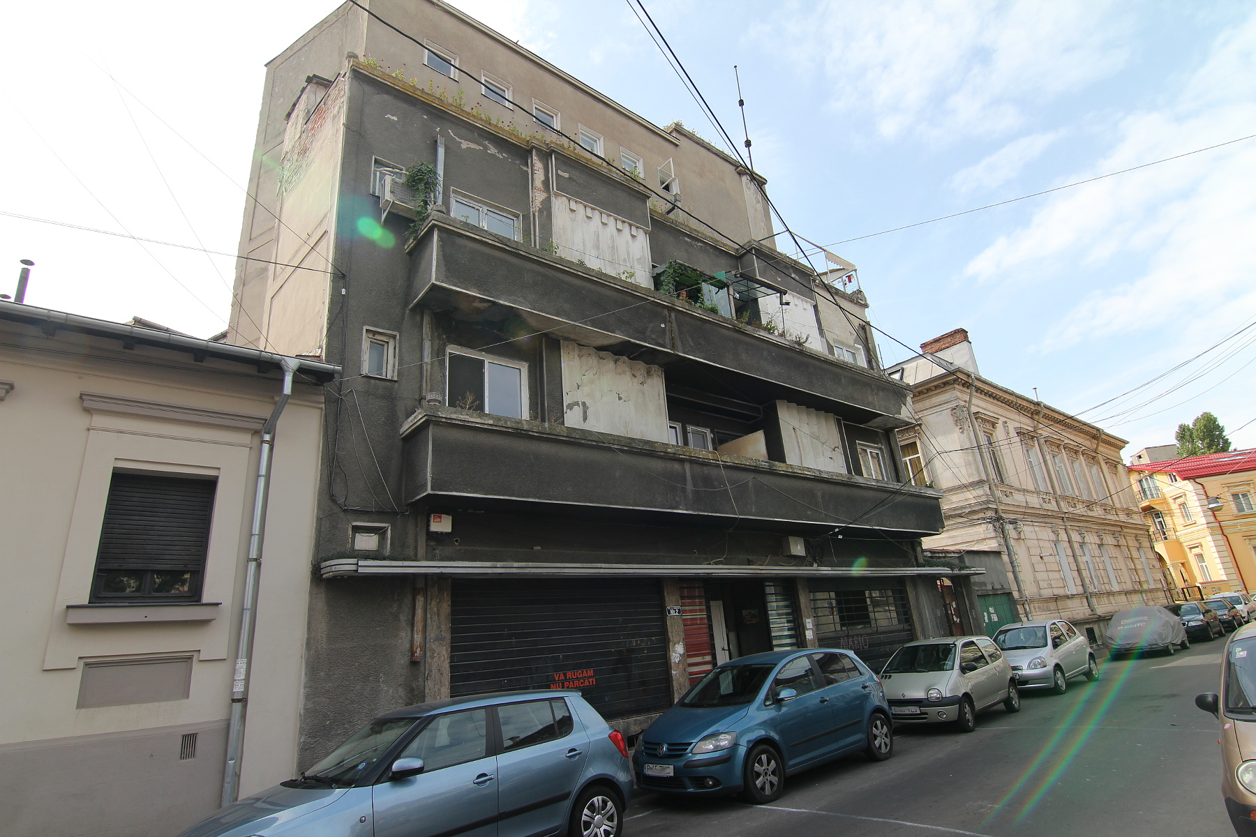 Imobil pe Str Robescu